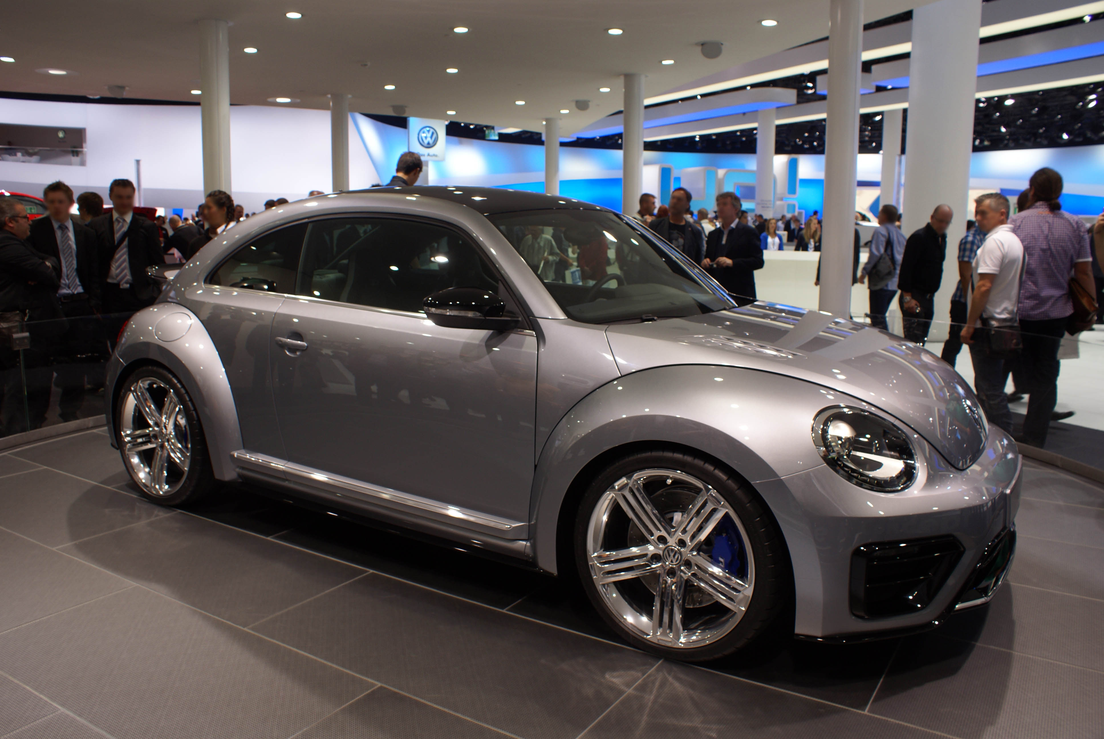 VW Beetle R